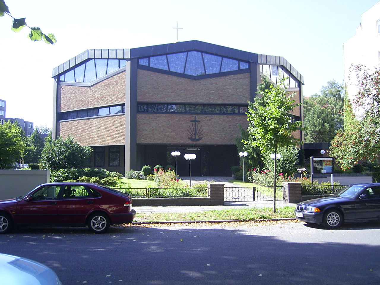 Neuapostolische Kirche in Borgfelde (Klaus-Groth-Straße)